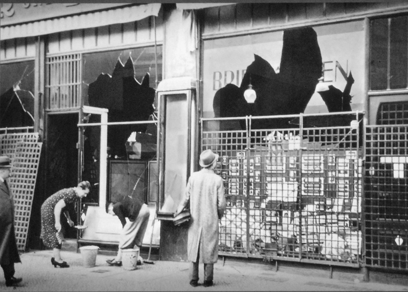 "A Berlin-Tieregarten, le 10 novembre 1938, dans la Potsdamer Strasse, les commercants juifs enlèvent les traces du pogrom de la nuit ." Photographie exposée au centre d'information du mémorial aux juifs assassinés d'Europe (Berlin) The Memorial to the murdered Jews of Europe (Berlin) Le champ des 2.711 stèles du mémorial, situé près de la Potsdamer Platz, a une superficie de 10.073 m2. Il a été ouvert au public le 12 mai 2005. Il comprend un centre d'information qui présente la politique d'extermination menée par les nazis de 1933 à 1945